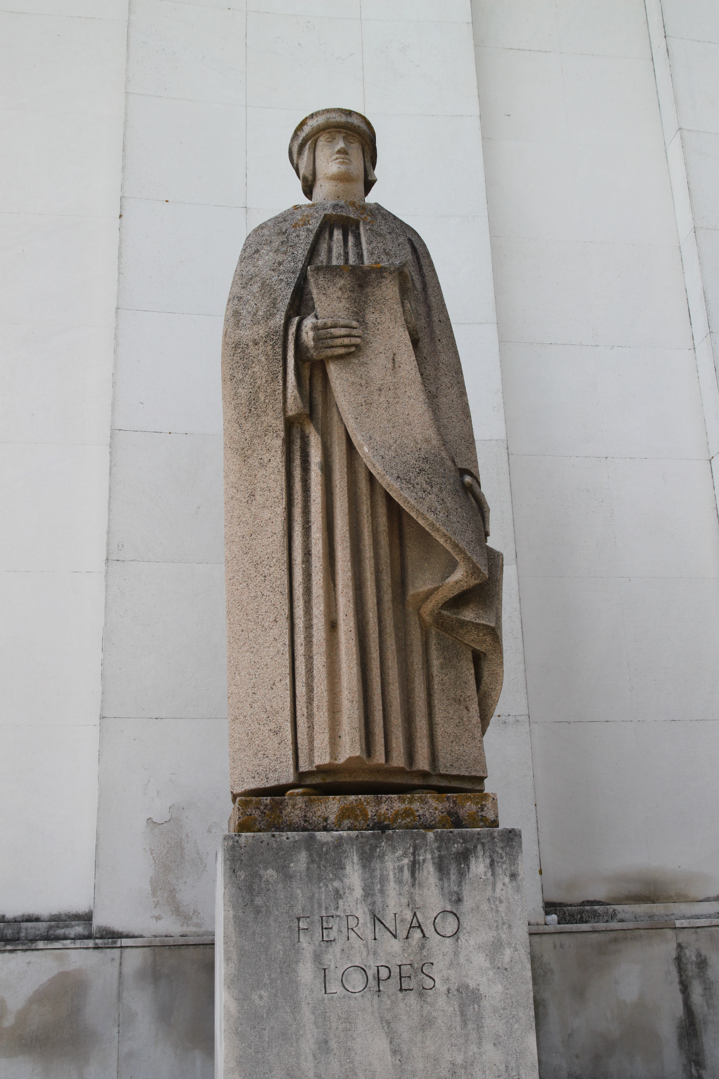 Biblioteca Nacional de Portugal e jardins envolventes, incluindo o património integrado This file was uploaded for Wiki Loves Monuments in Portugal with the unique identifier 7389721.